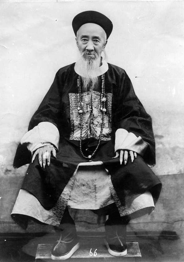 張之洞朝服照